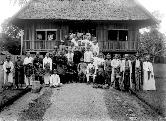 Negatief. Groep hoofden voor de woning van de plaatsvervanger van de Sultan van Bima, Radja Naib, die in het midden zit